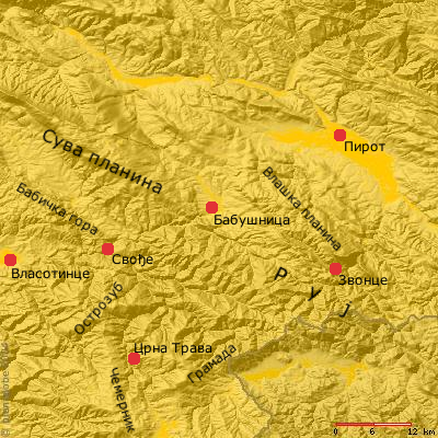 Бабушница и околина, југоисточна Србија.